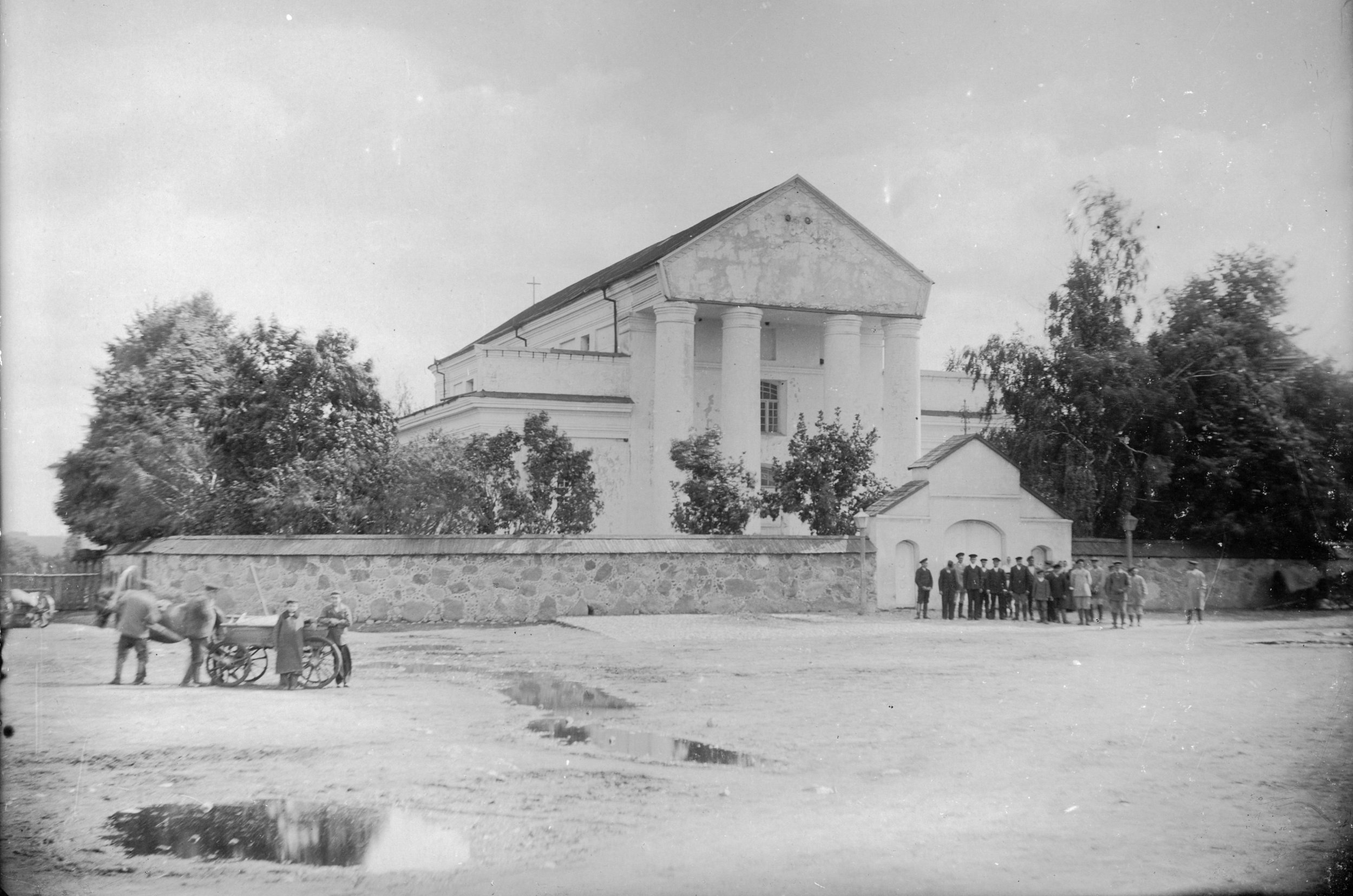 Беларуская (тарашкевіца): Даўгінаў (Daŭhinaŭ), пляц Рынак (plac Rynak). Касьцёл